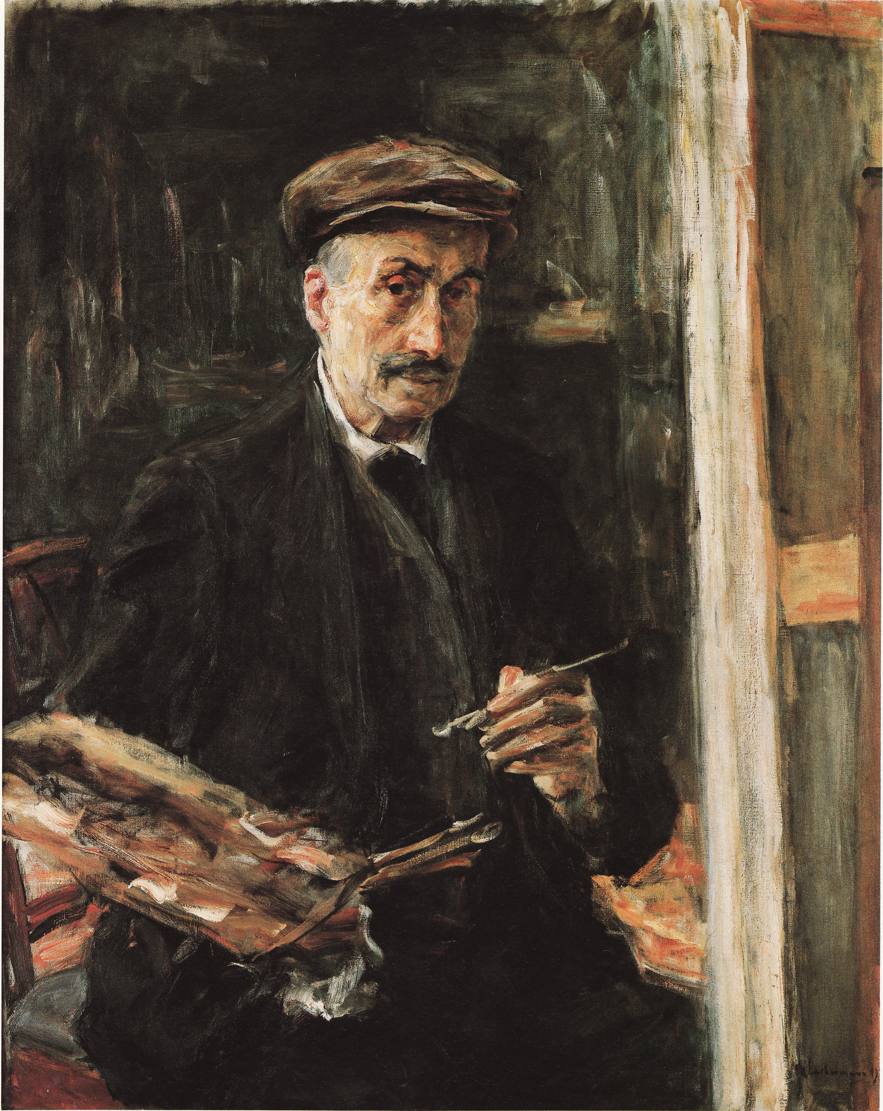 Selbstbildnis mit Sportmütze an der Staffelei